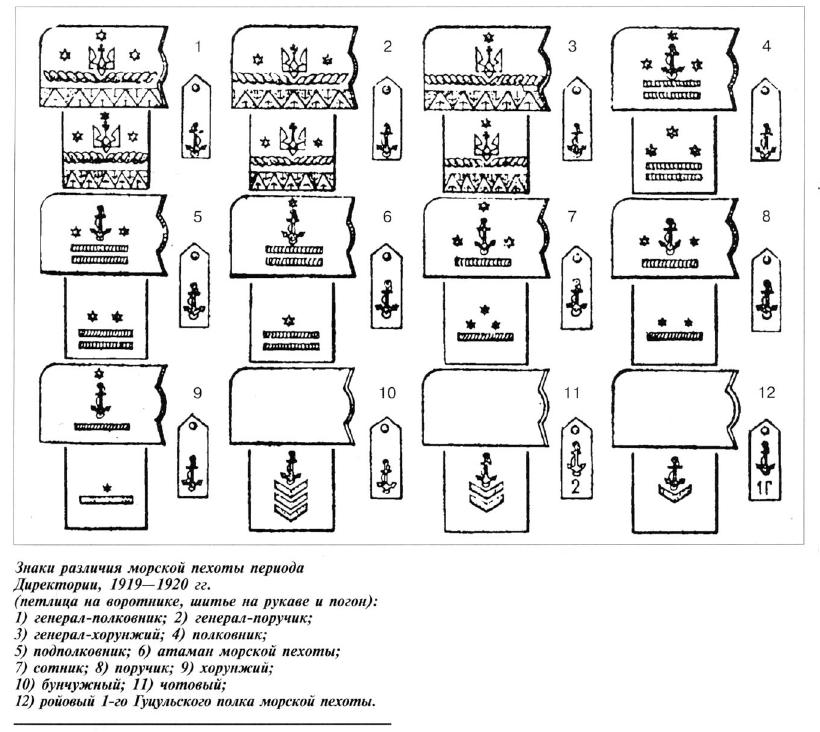 Элементы униформ морской пехоты УДФ периода Директории УНР, 1920 гг